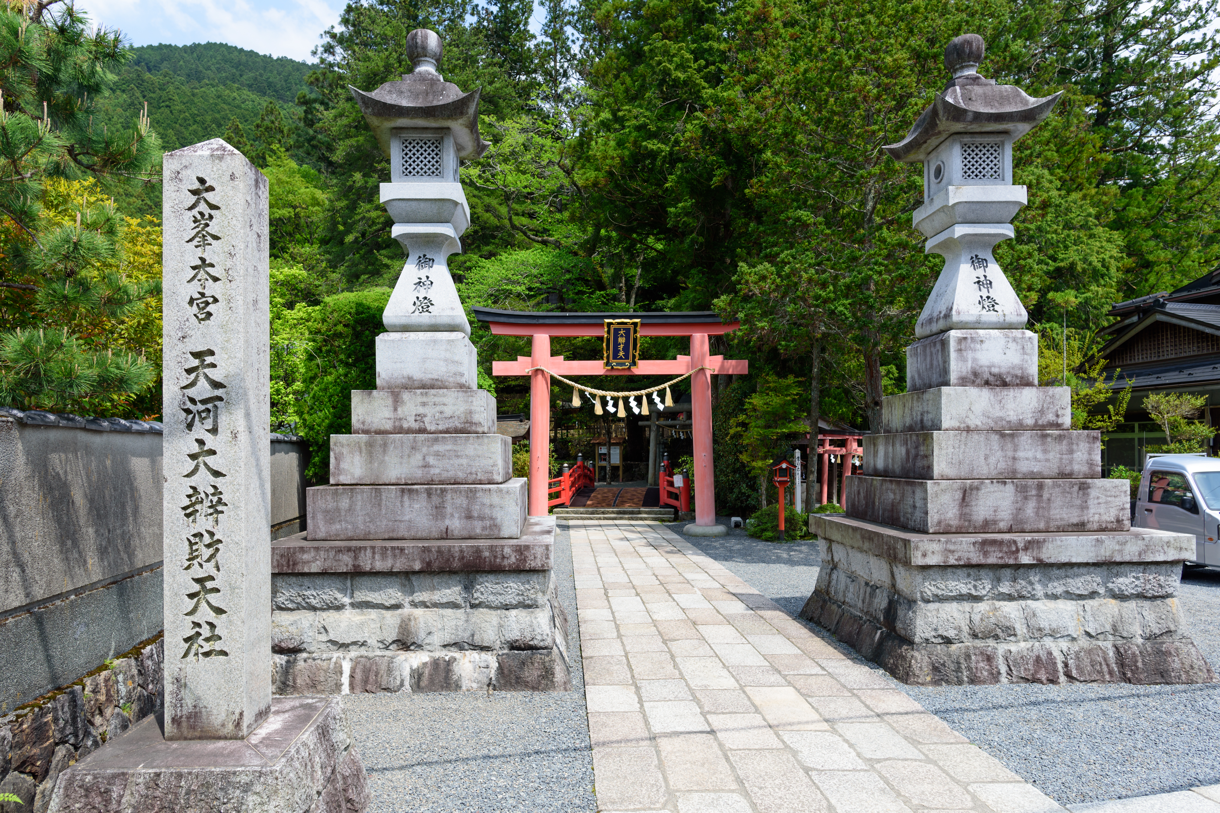 天河大辯財天社